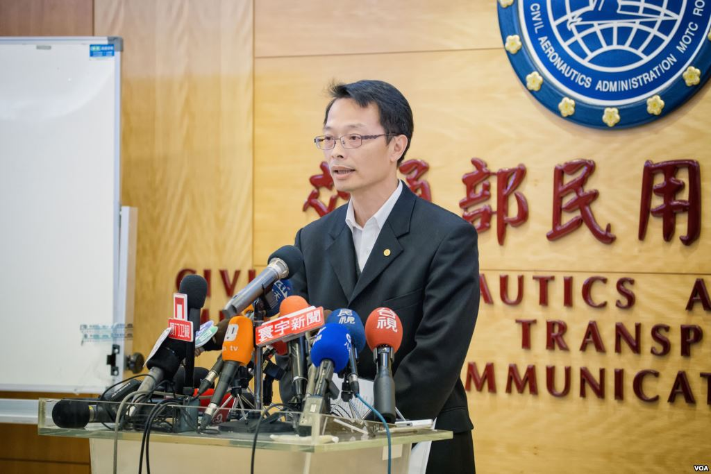 中華民國交通部民用航空局飛航標準組組長林俊良表示，經過整頓以後，他有信心讓自己和親人繼續搭乘ATR飛機。